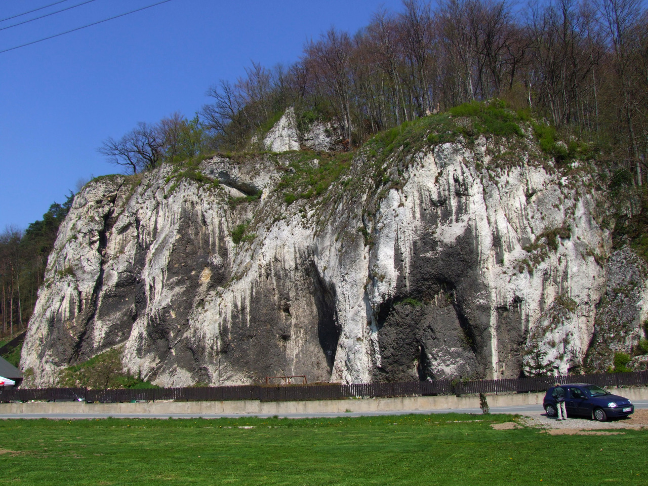 Skały Wernyhory (Ojcowski Park Narodowy)